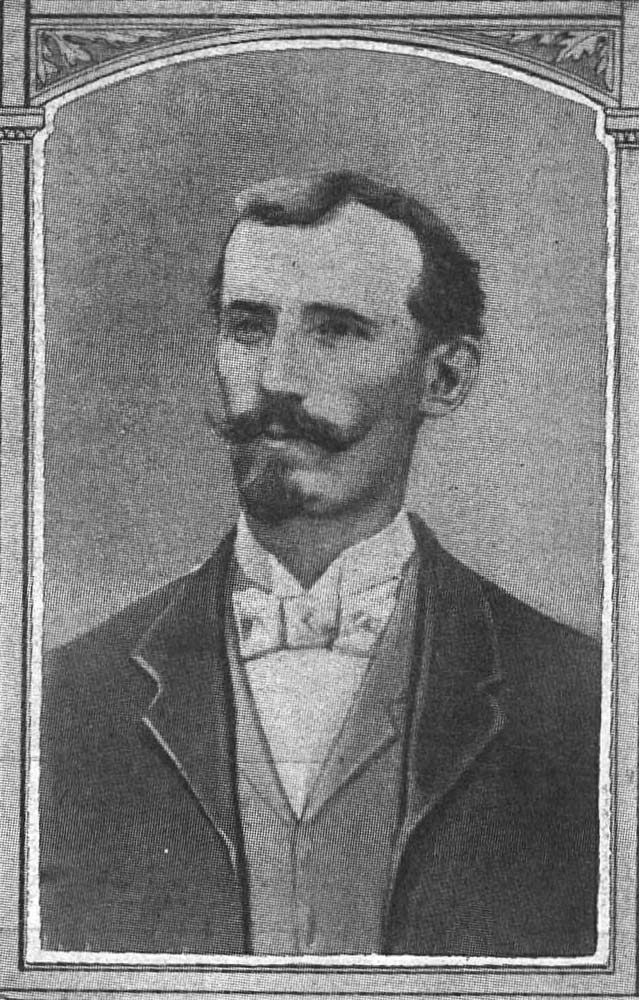 Jacques Le Lorrain